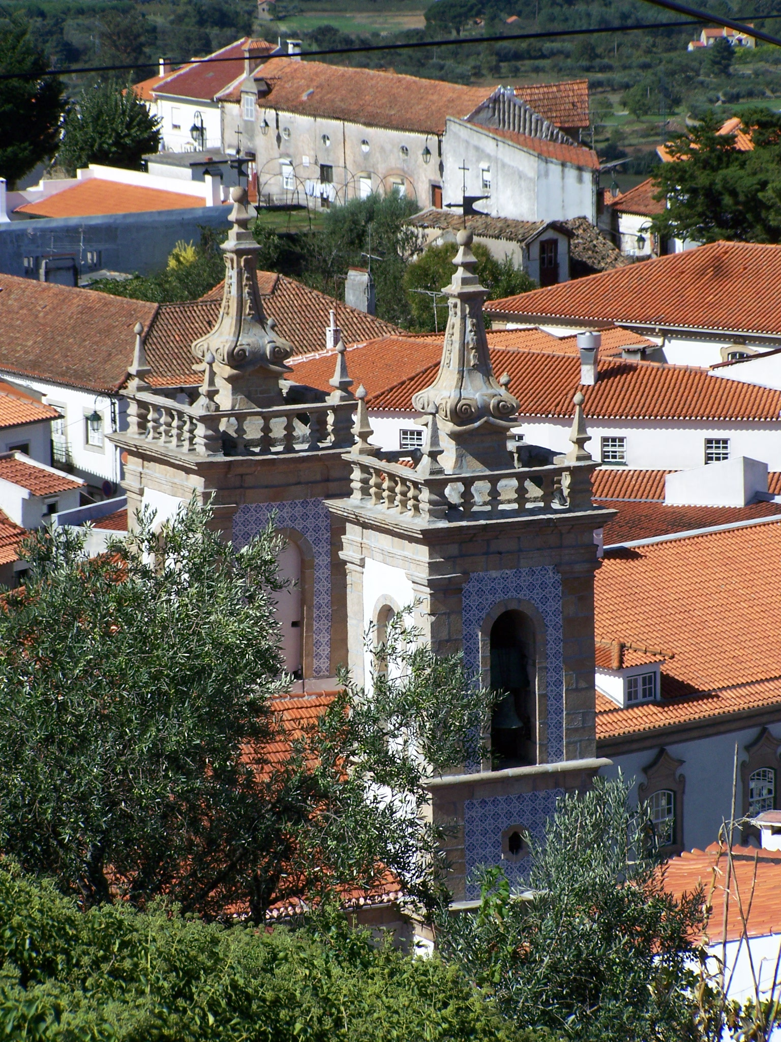 Vista para Gouveia, Portugal.